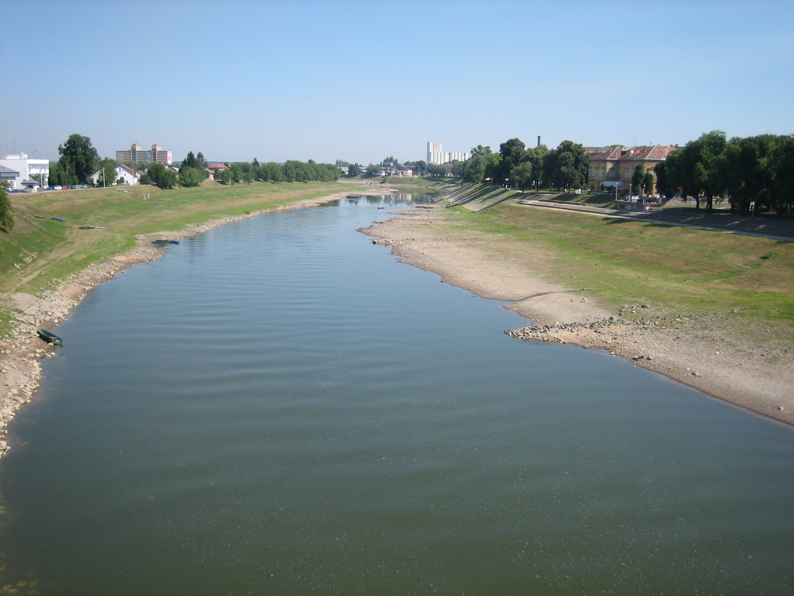 River Kupa in Sisak, Croatia. / Rijeka Kupa u središtu Siska.